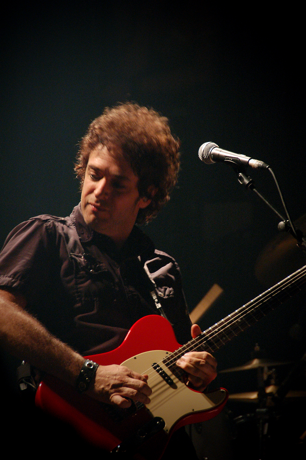 Gustavo Cerati durante la gira "Ahi Vamos" en la segunda de sus presentaciones en Madrid, la noche del 10 de Octubre de 2006.